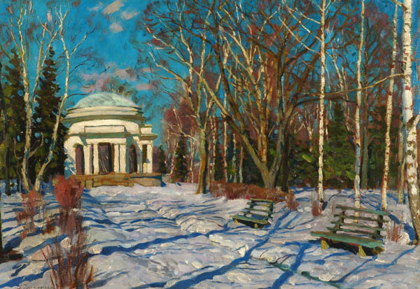 Музей: Нацыянальны мастацкі музей Рэспублікі Беларусь Тып: выяўленчыя крыніцы Від: жывапіс Прадметнае імя: жывапіс Назва/аўтарская назва: Зімовы пейзаж. Вятка. (Ратонда ў Аляксандраўскім садзе) Аўтары: Жукоўскі Станіслаў Юльянавіч; Матэрыялы: палатно; фанера; Тэхналогіі стварэння: алей; Дата стварэння: 1921 г. Памеры: 45,3х67,2